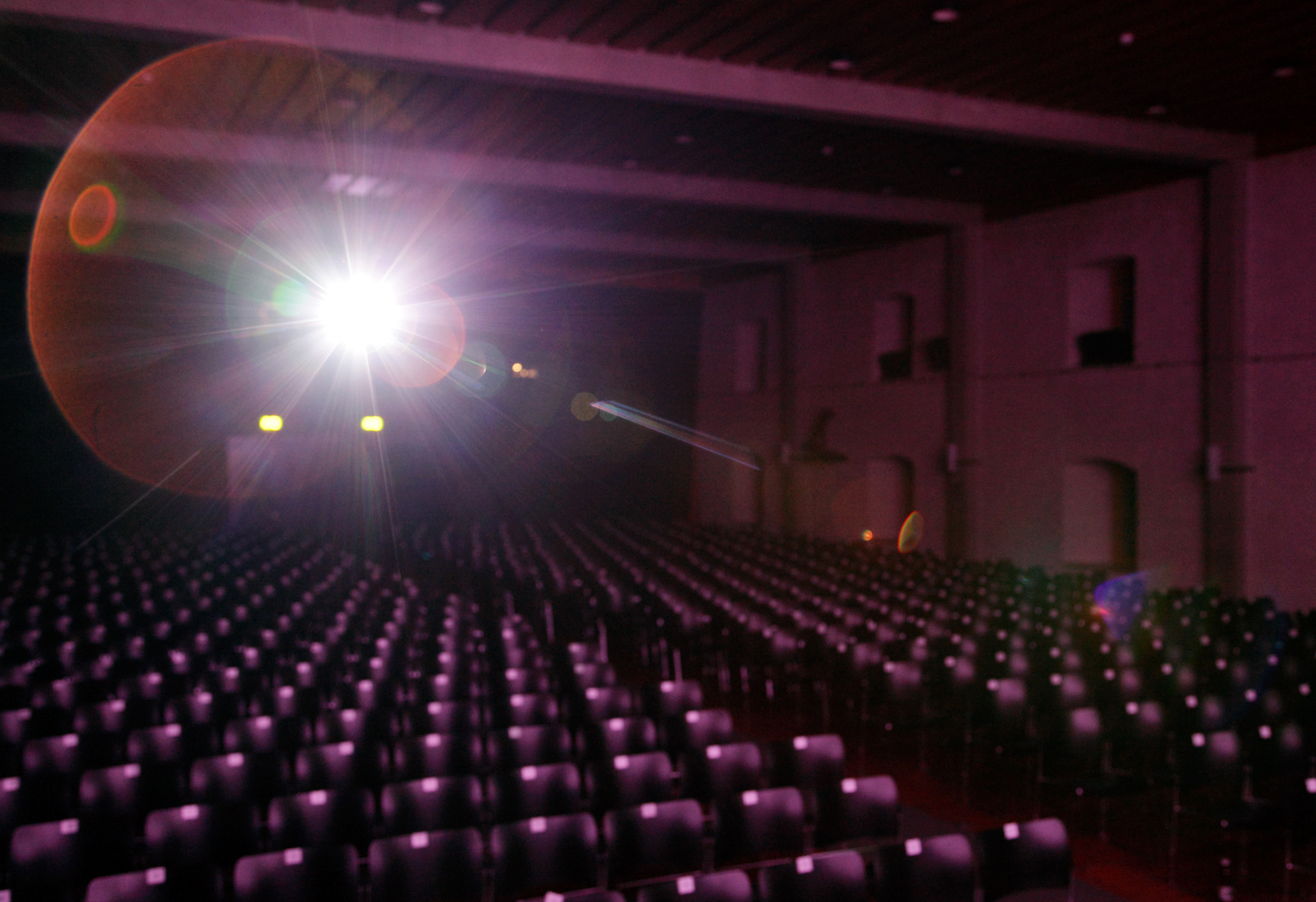 Kino Landhaus